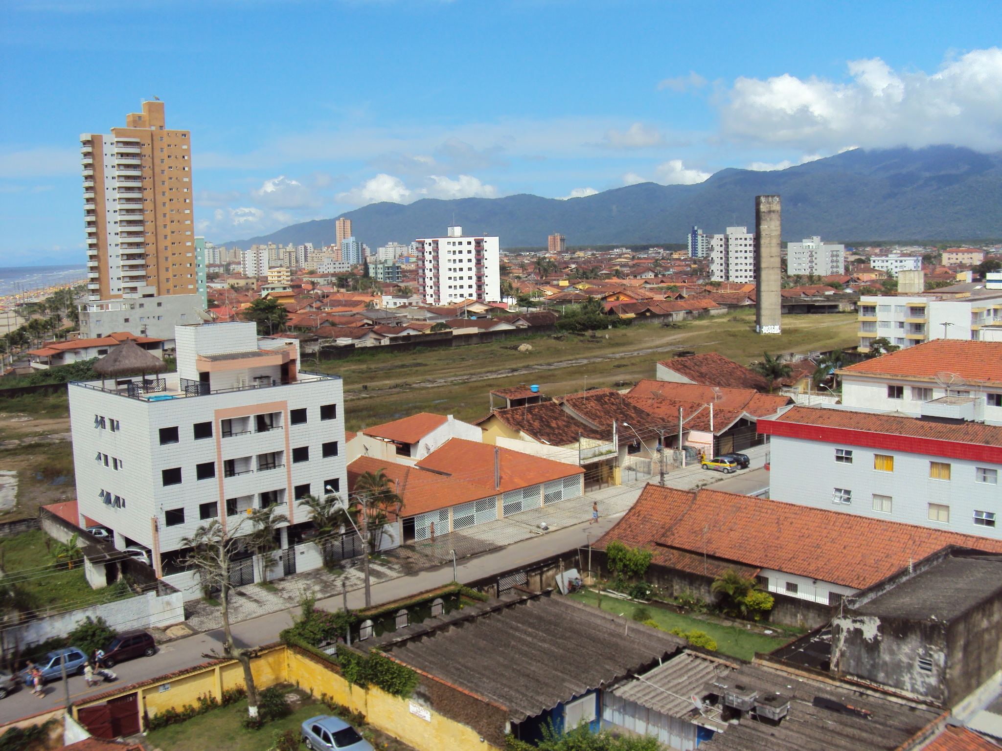 Praia Grande - Caiçara - janeiro 2010